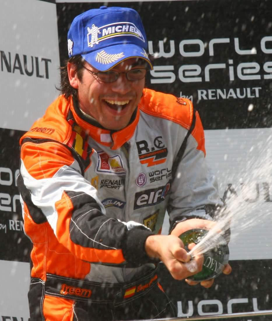 Borja Garcia podium World Series by Renault